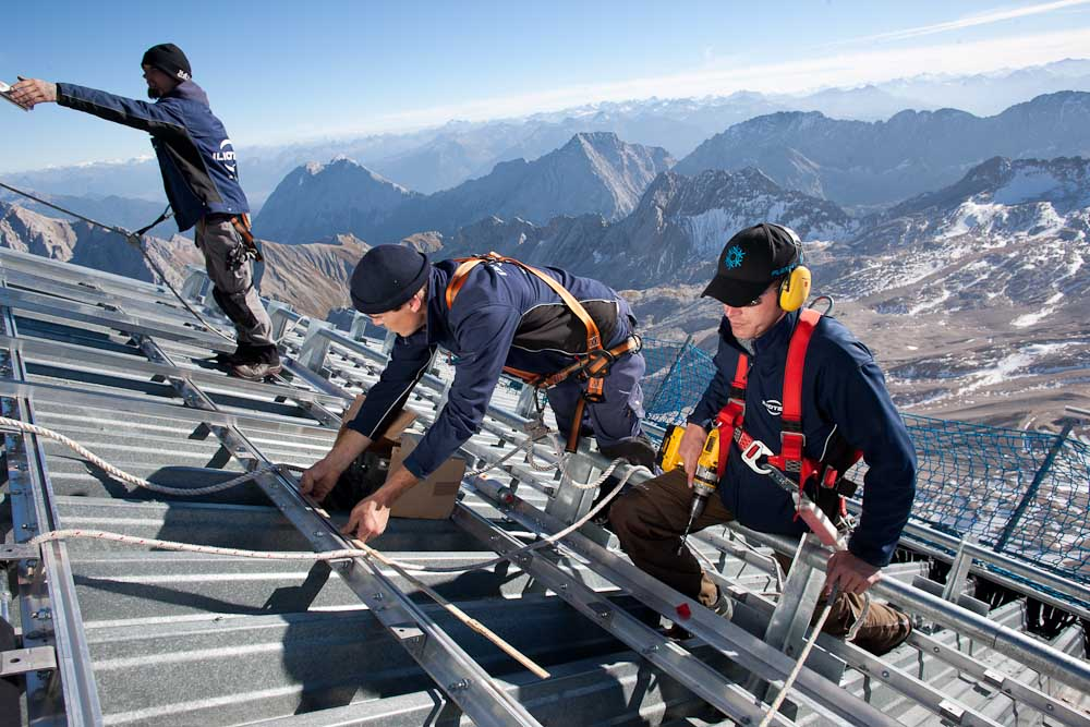 Montage PV-Anlage Zugspitze